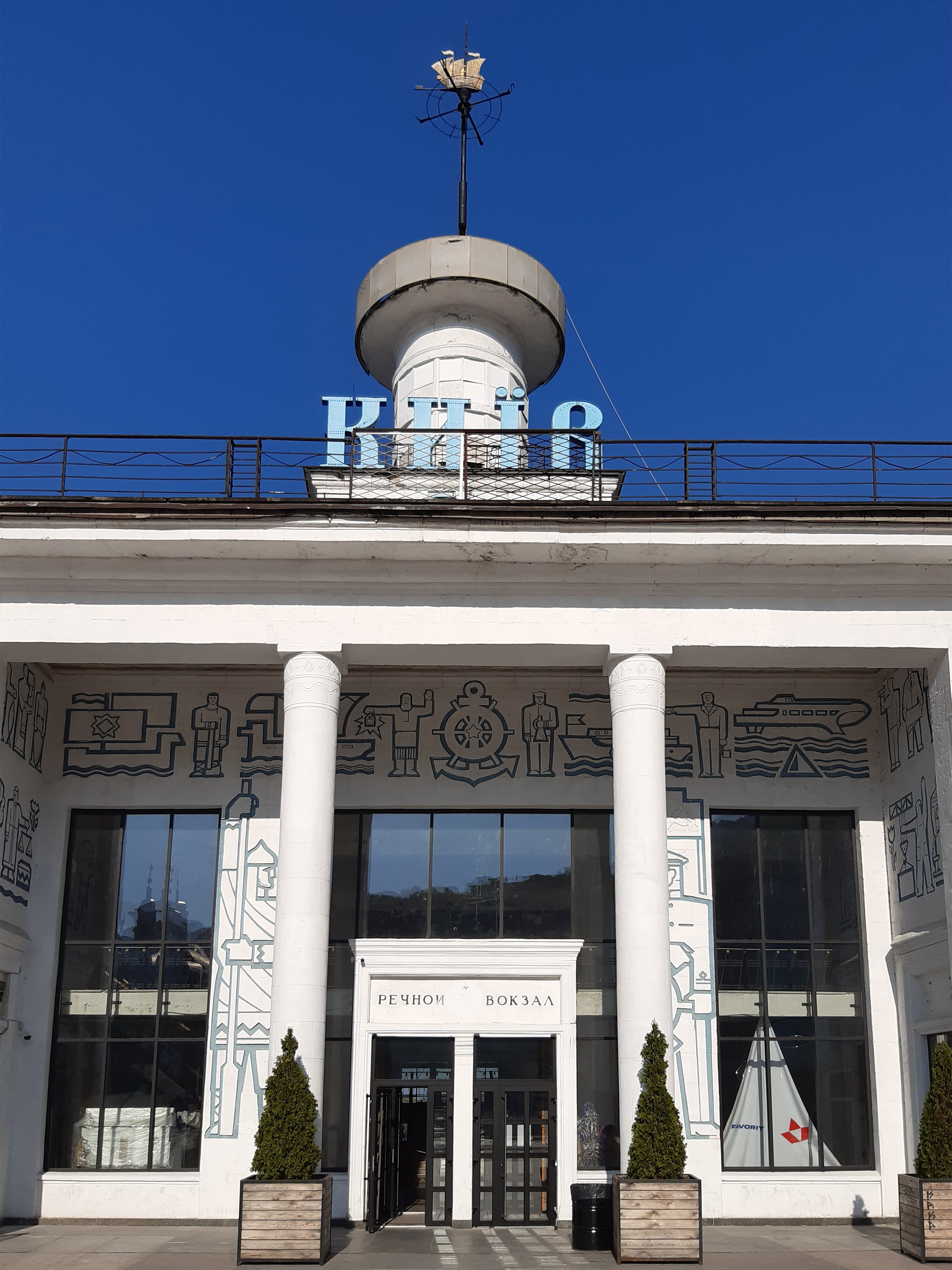 Портик Київського річкового вокзалу